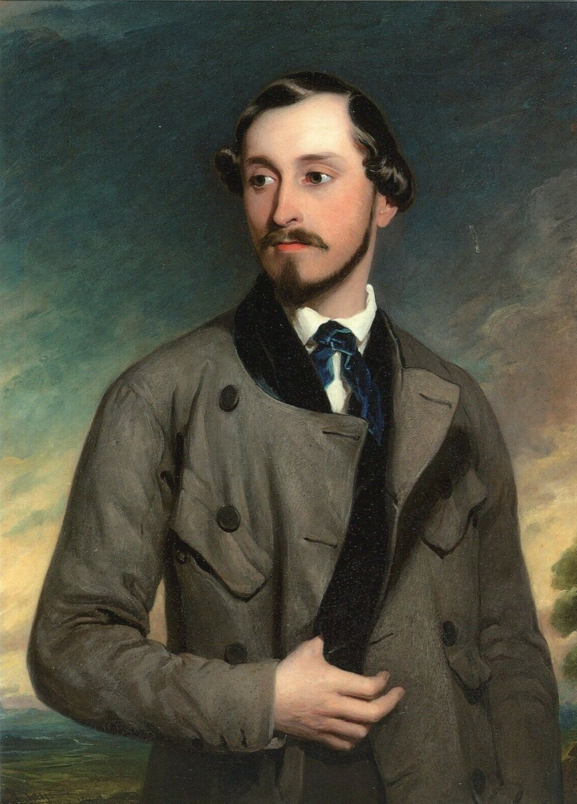 Portrait Ernst II., Herzog von Sachsen-Coburg und Gotha